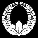 Ando family crest